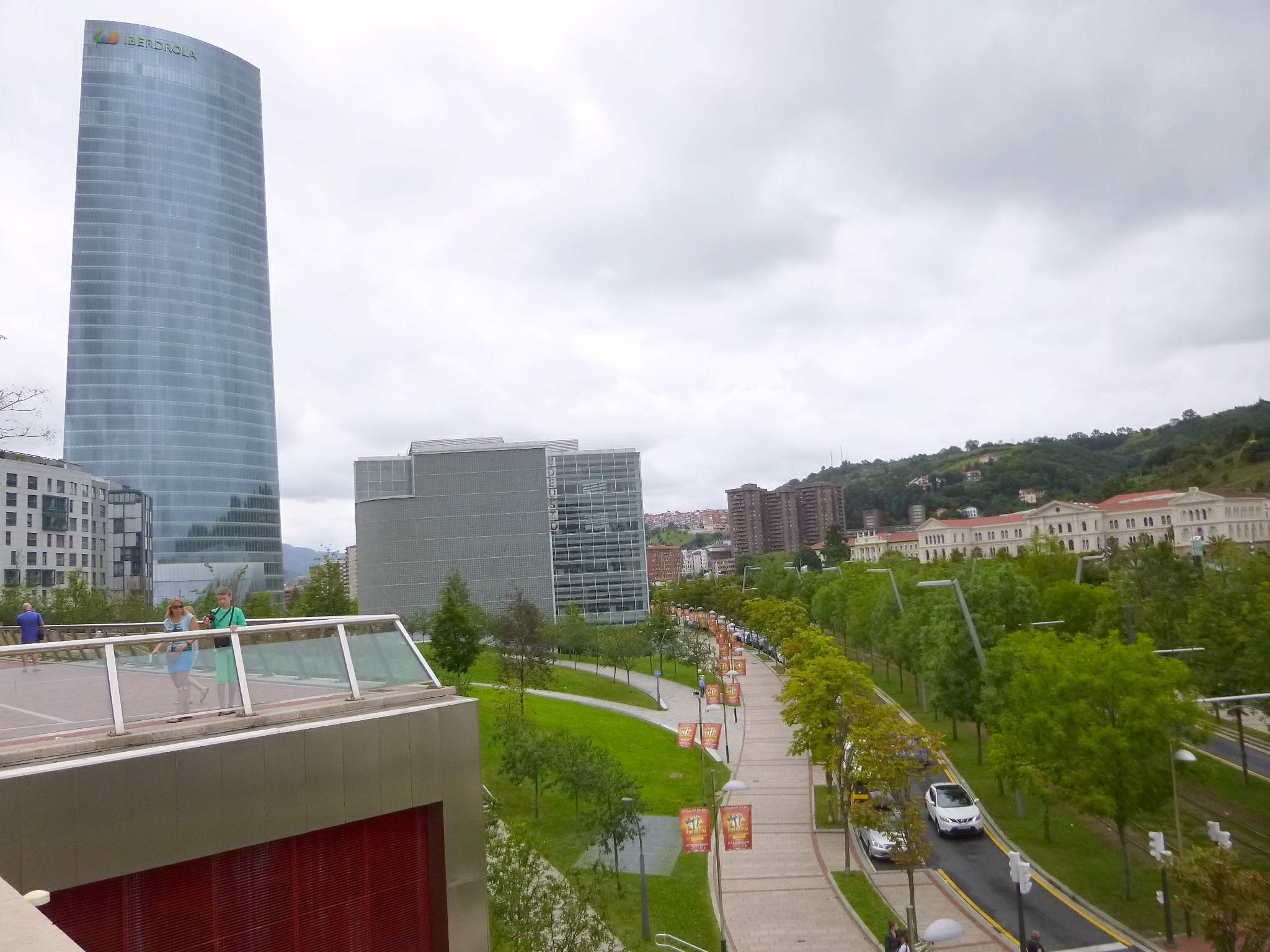 Avenida Abandoibarra (Bilbao)